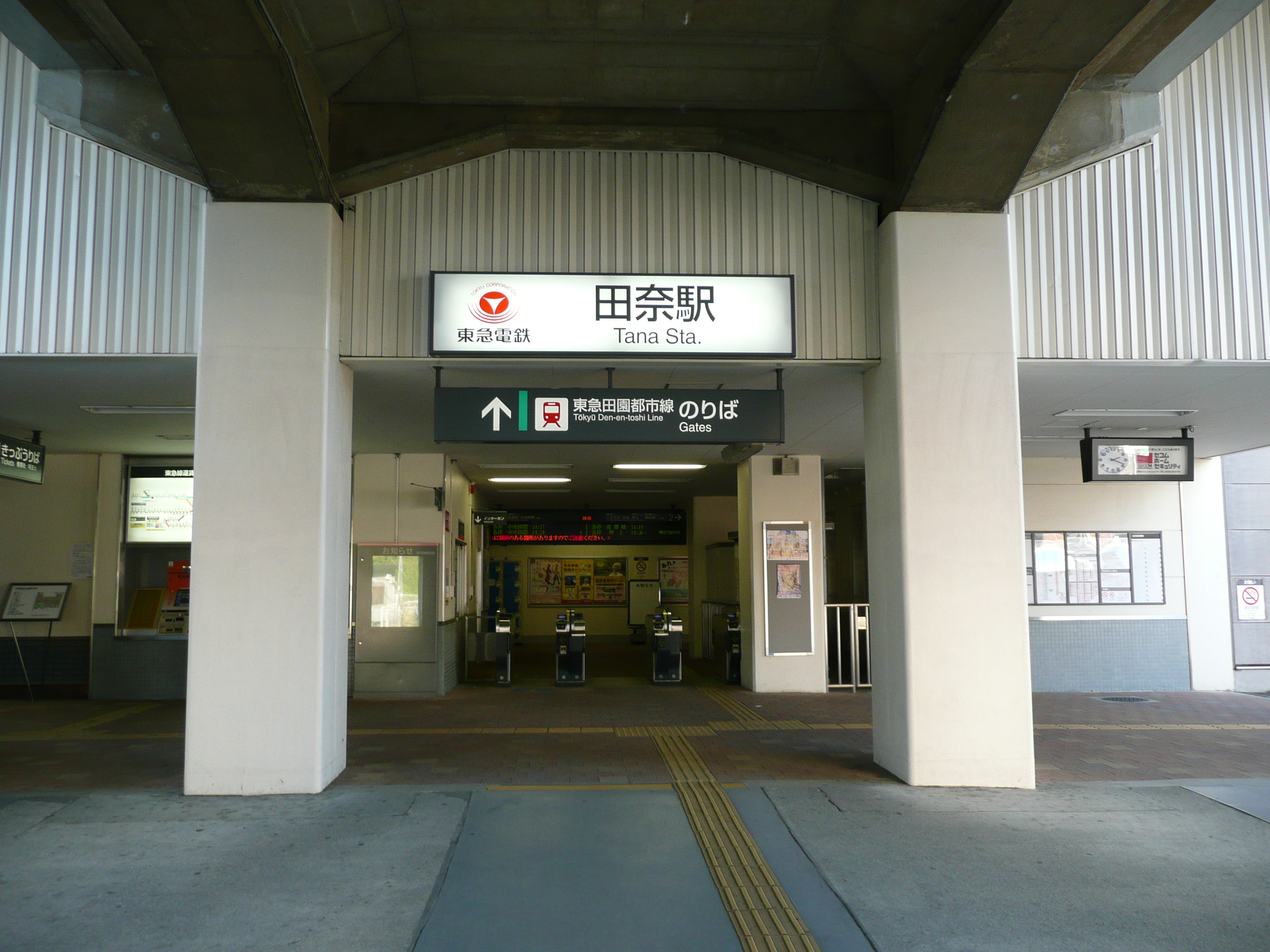 田奈駅